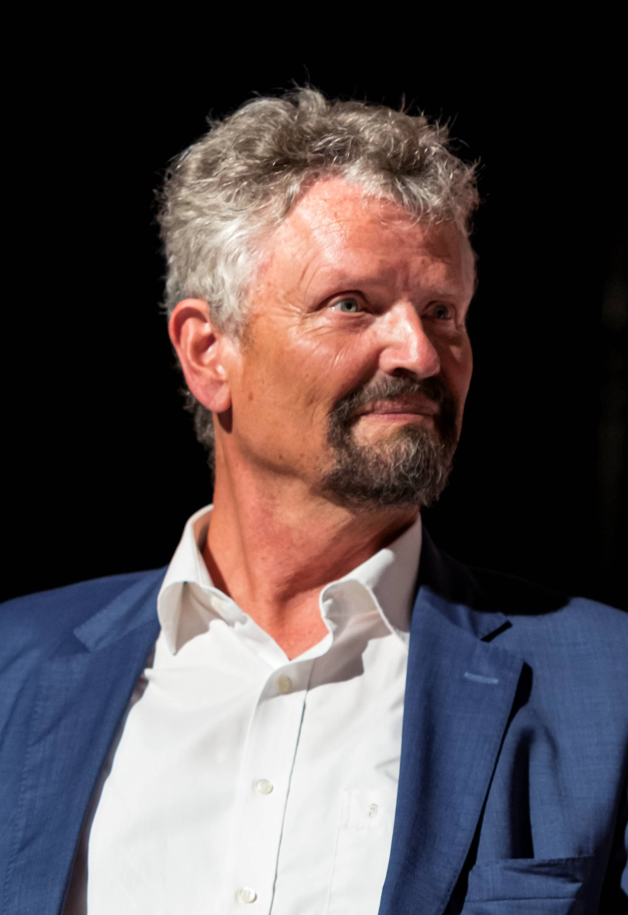 Bilder vom ZMF 2015 Die Gala am 12. 07. 2015